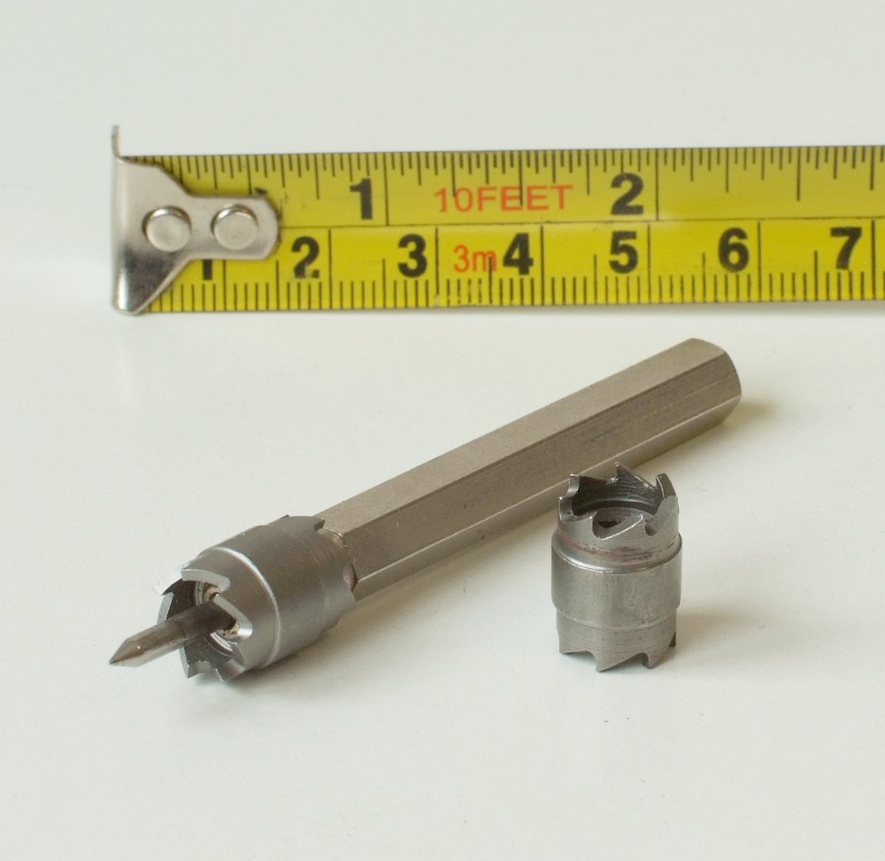 Schweißpunktfräser ca. 10mm